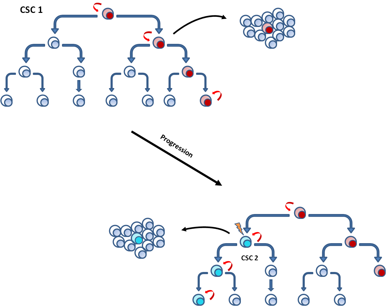 oba systémy